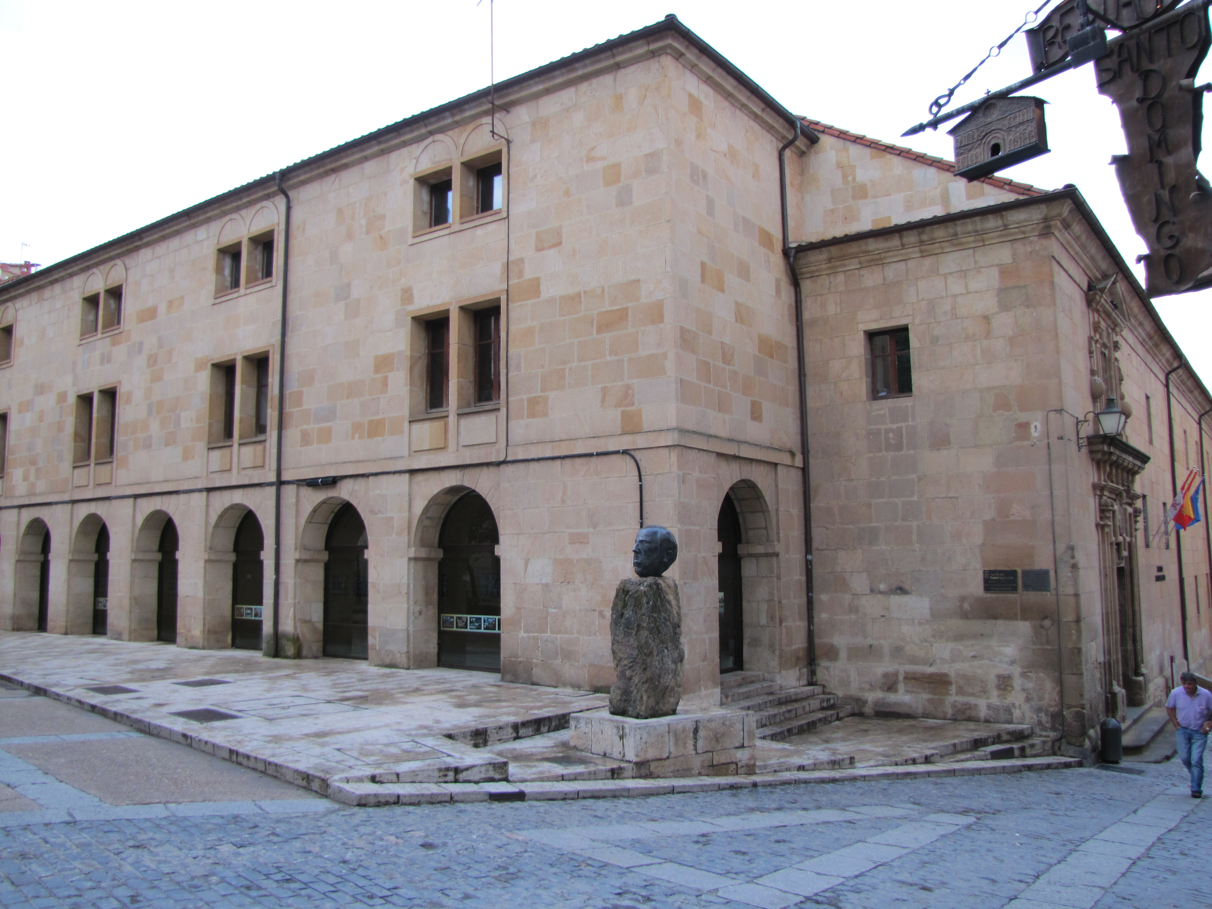 Instituto Antonio Machado, antiguo Colegio de la Compañía de Jesús en Soria.